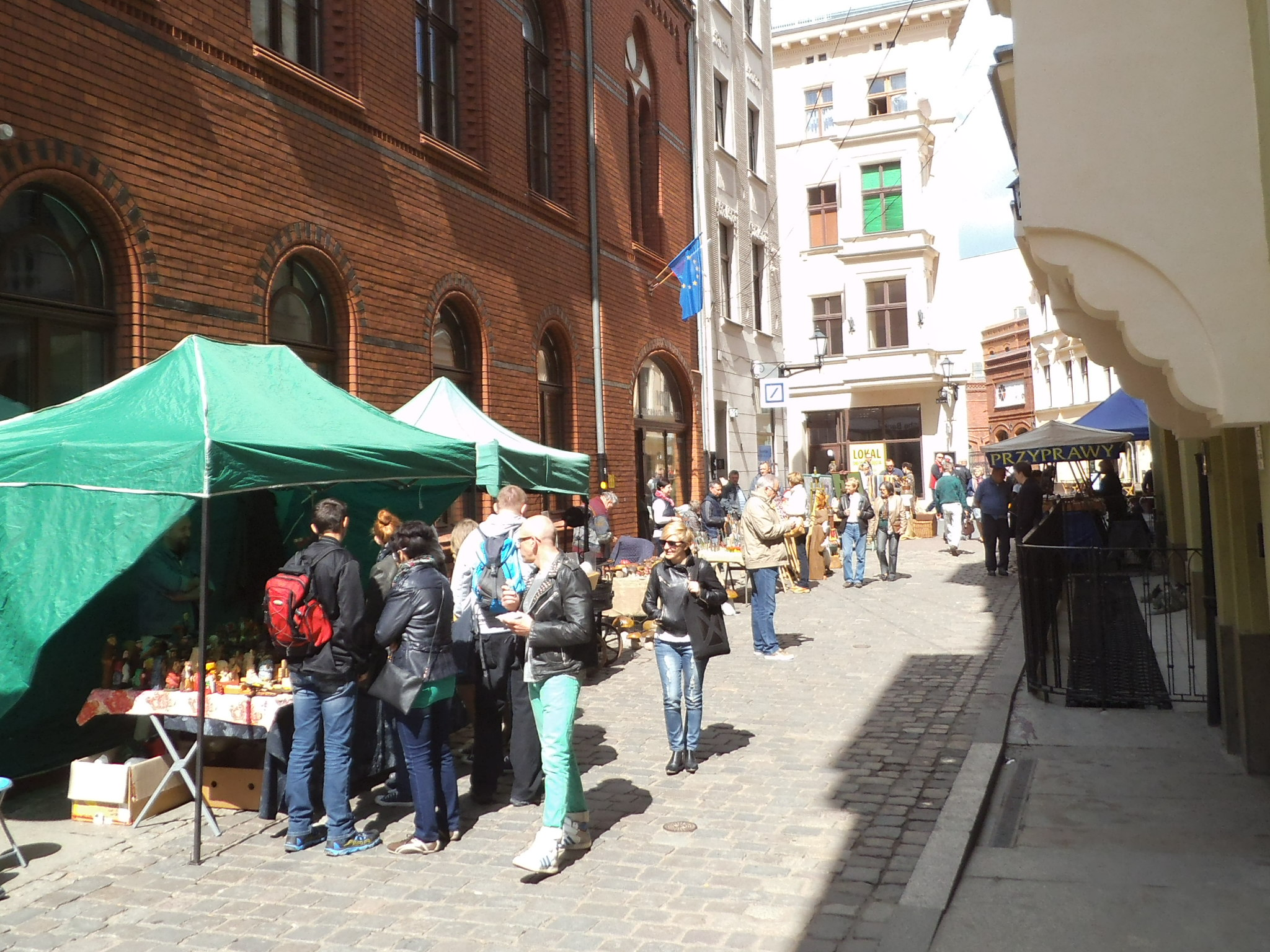 Jarmark na ulicy Przedzamcze w Toruniu